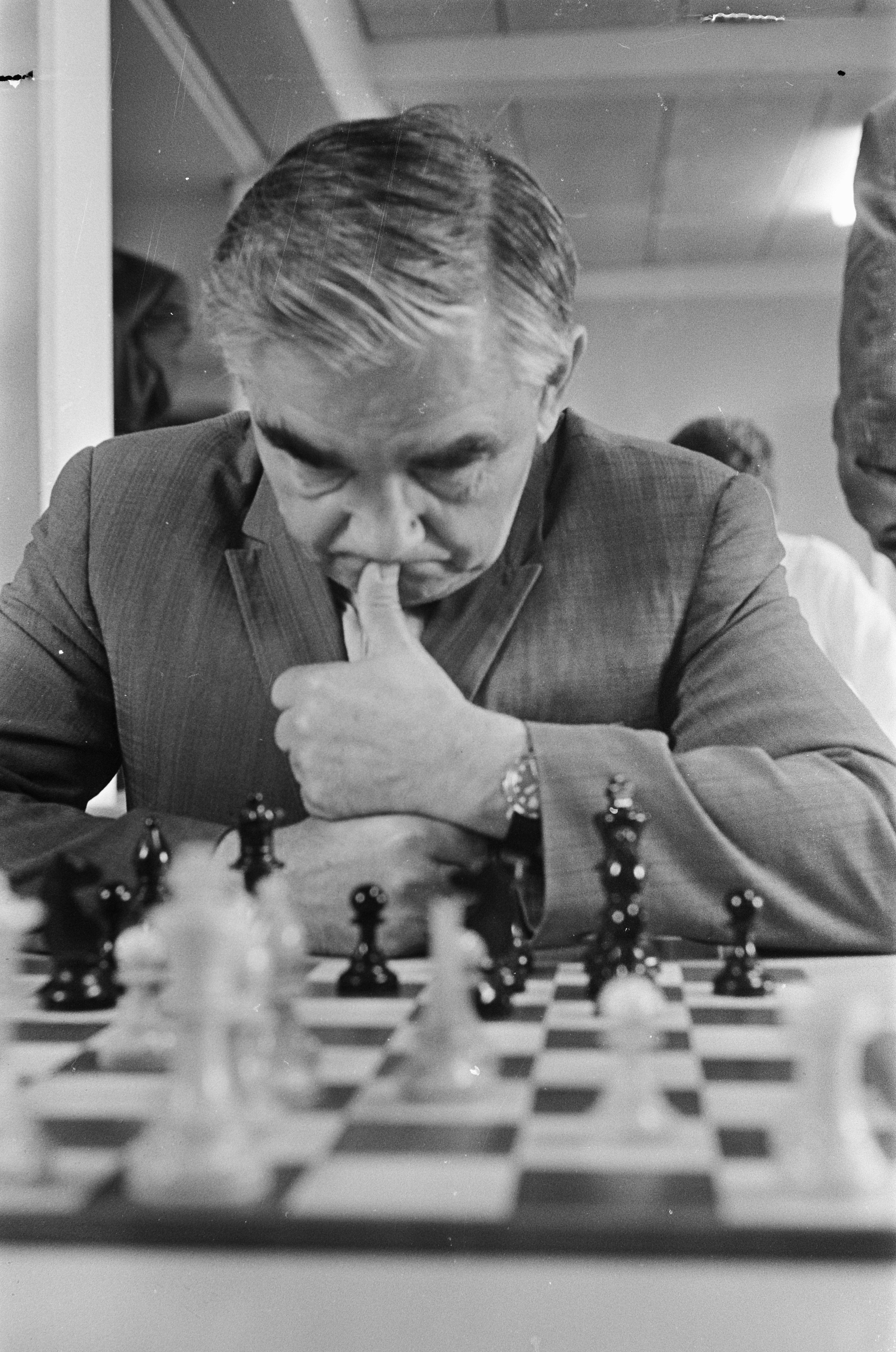 Collectie / Archief : Fotocollectie Anefo Reportage / Serie : [ onbekend ] Beschrijving : IBM-schaaktoernooi van start. De Russische grootmeester A. Kotow Datum : 16 juli 1968 Trefwoorden : schaken Persoonsnaam : A. Kotow Instellingsnaam : IBM-Schaaktoernooi Fotograaf : Koch, Eric / Anefo Auteursrechthebbende : Nationaal Archief Materiaalsoort : Negatief (zwart/wit) Nummer archiefinventaris : bekijk toegang 2.24.01.05 Bestanddeelnummer : 921-5140